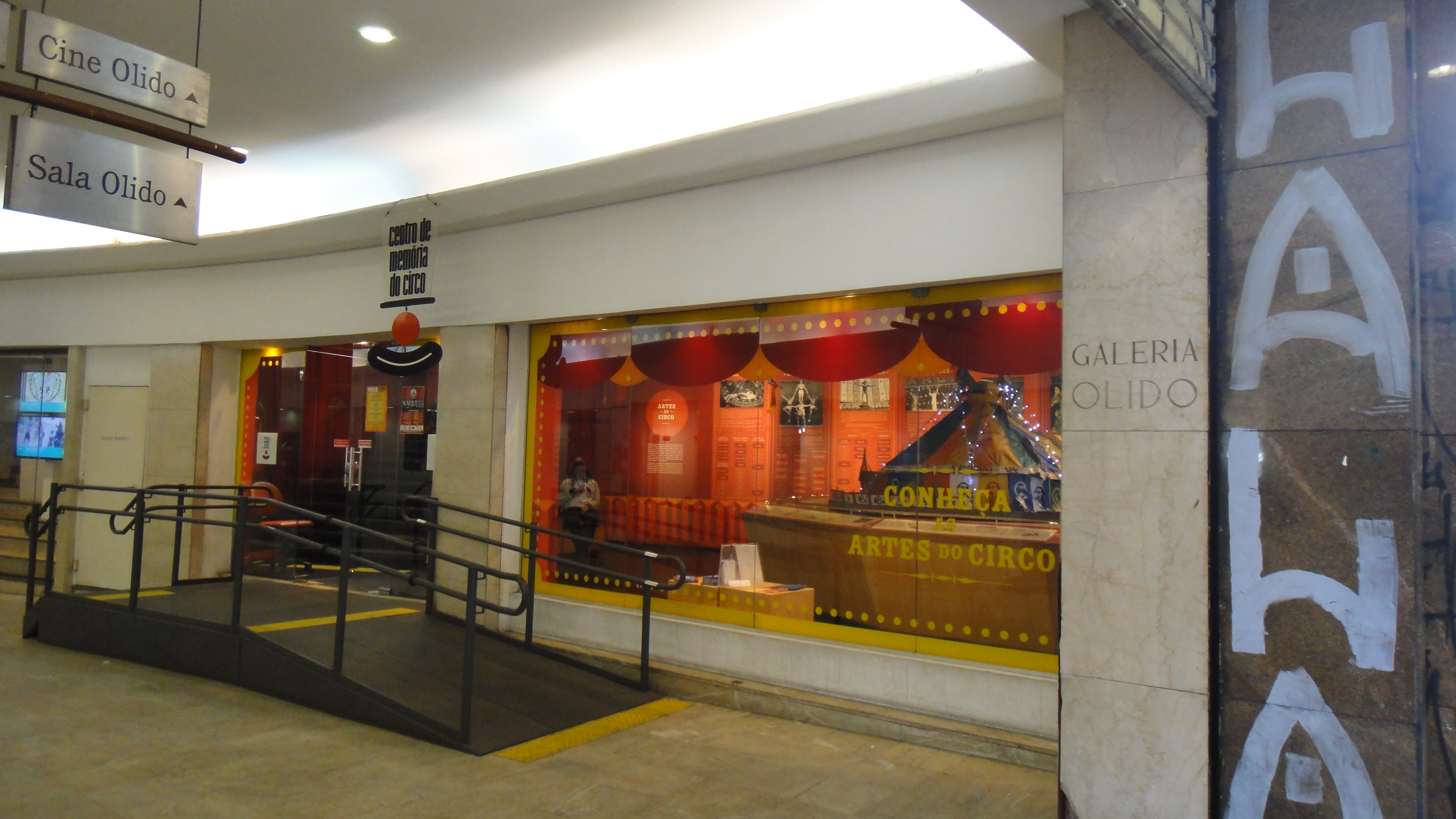 Faxada do Centro de Memória do Circo, mostrando também a Galeria onde o Centro se encontra